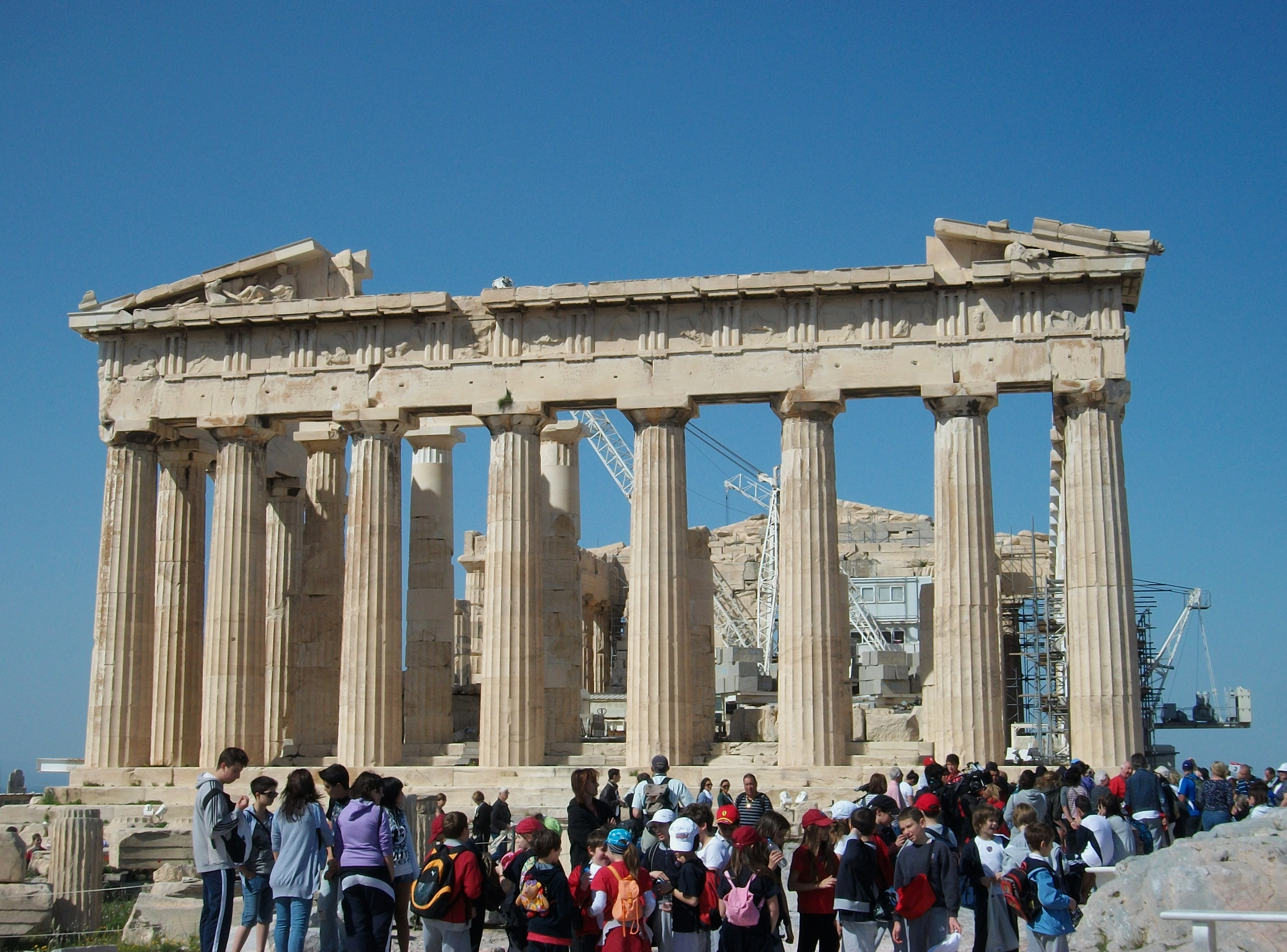 Partenó i turistes.